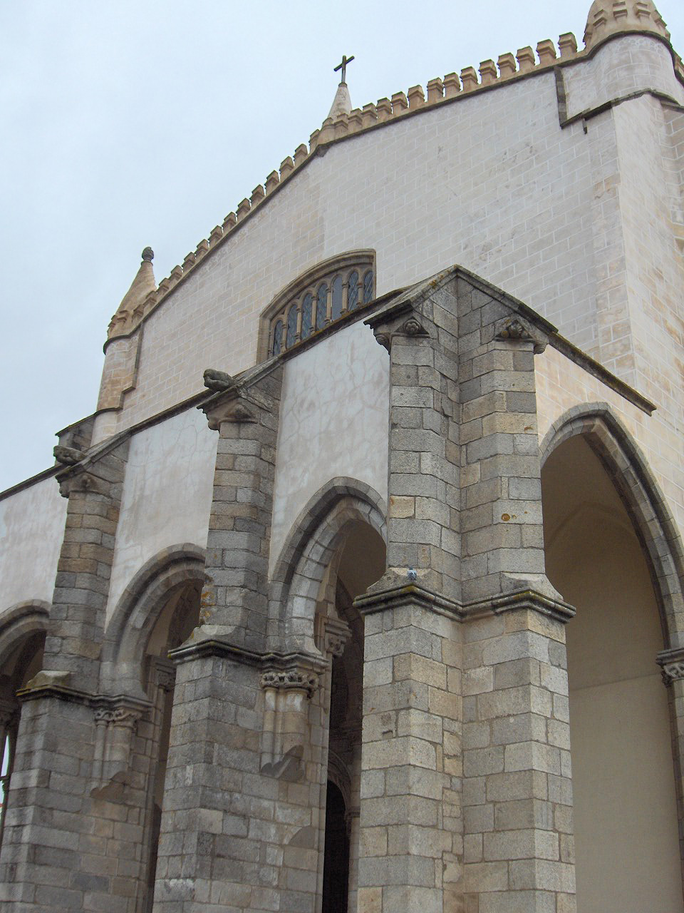 Façade of the Igreja de São Francisco, Évora, Portugal